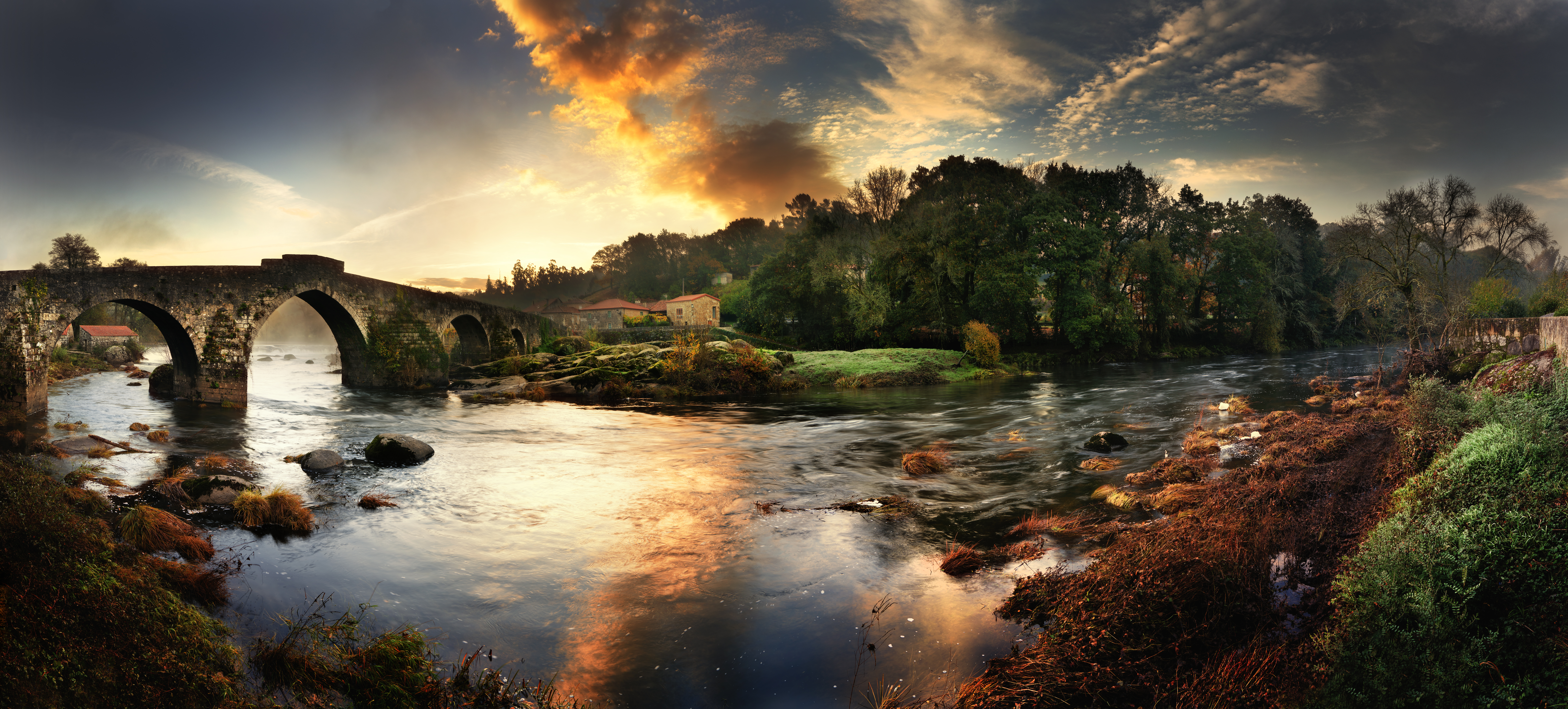 Ponte Maceira over Tambre river near Portor, Negreira, Galicia, Spain